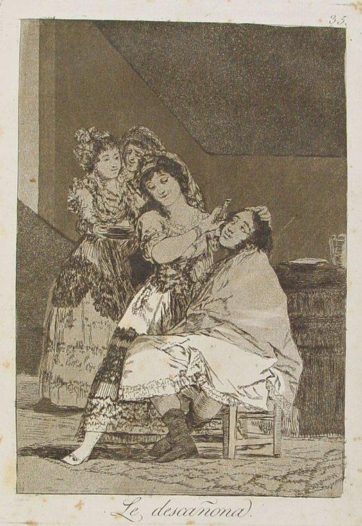 Capricho nº 35: Le descañona de Goya, serie Los Caprichos